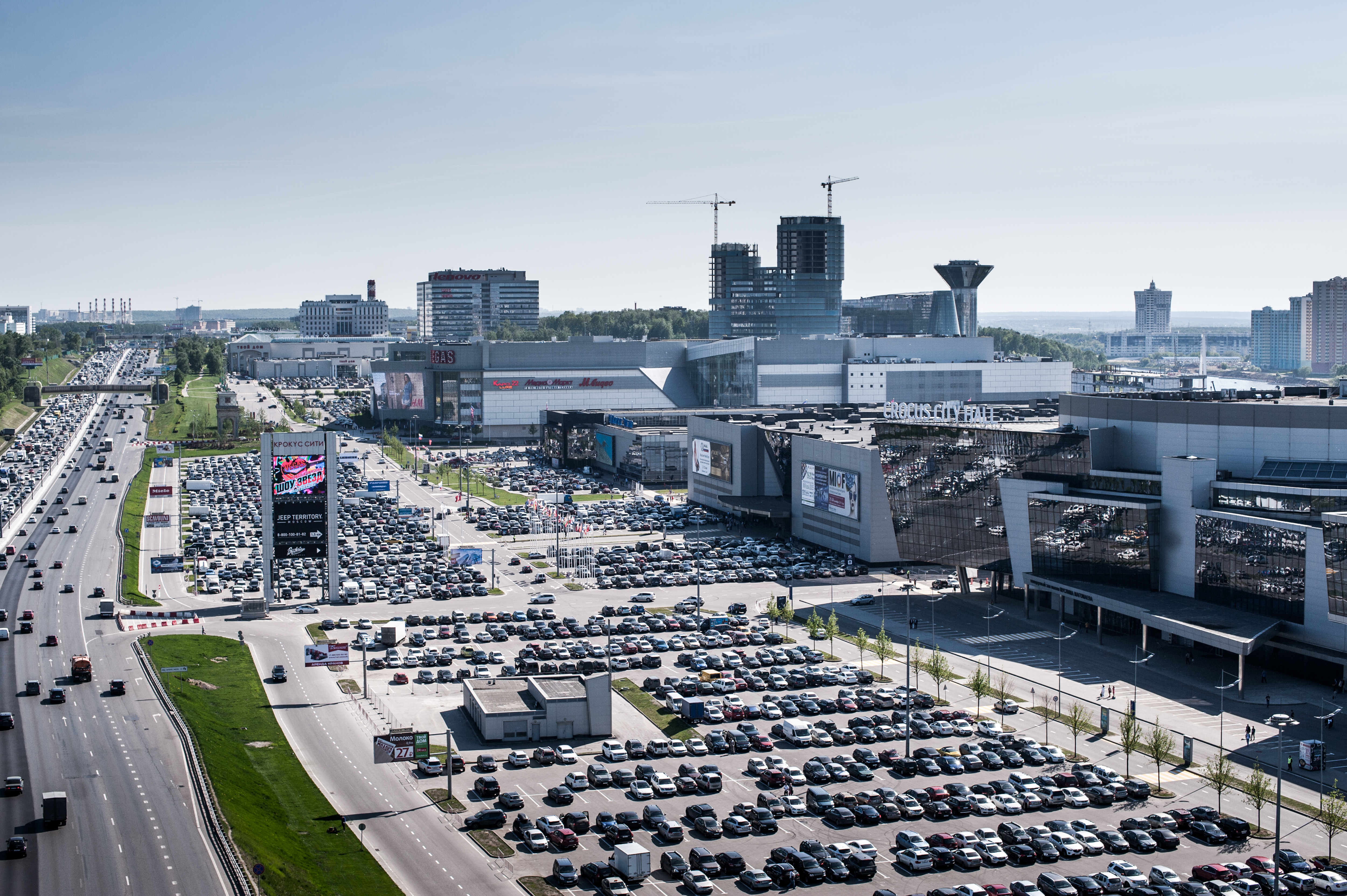 Международный выставочный центр «Крокус Экспо» – одна из самых крупных и современных выставочных площадок мира, член Всемирной ассоциации выставочной индустрии UFI в категориях «Организатор выставок» и «Выставочный центр».